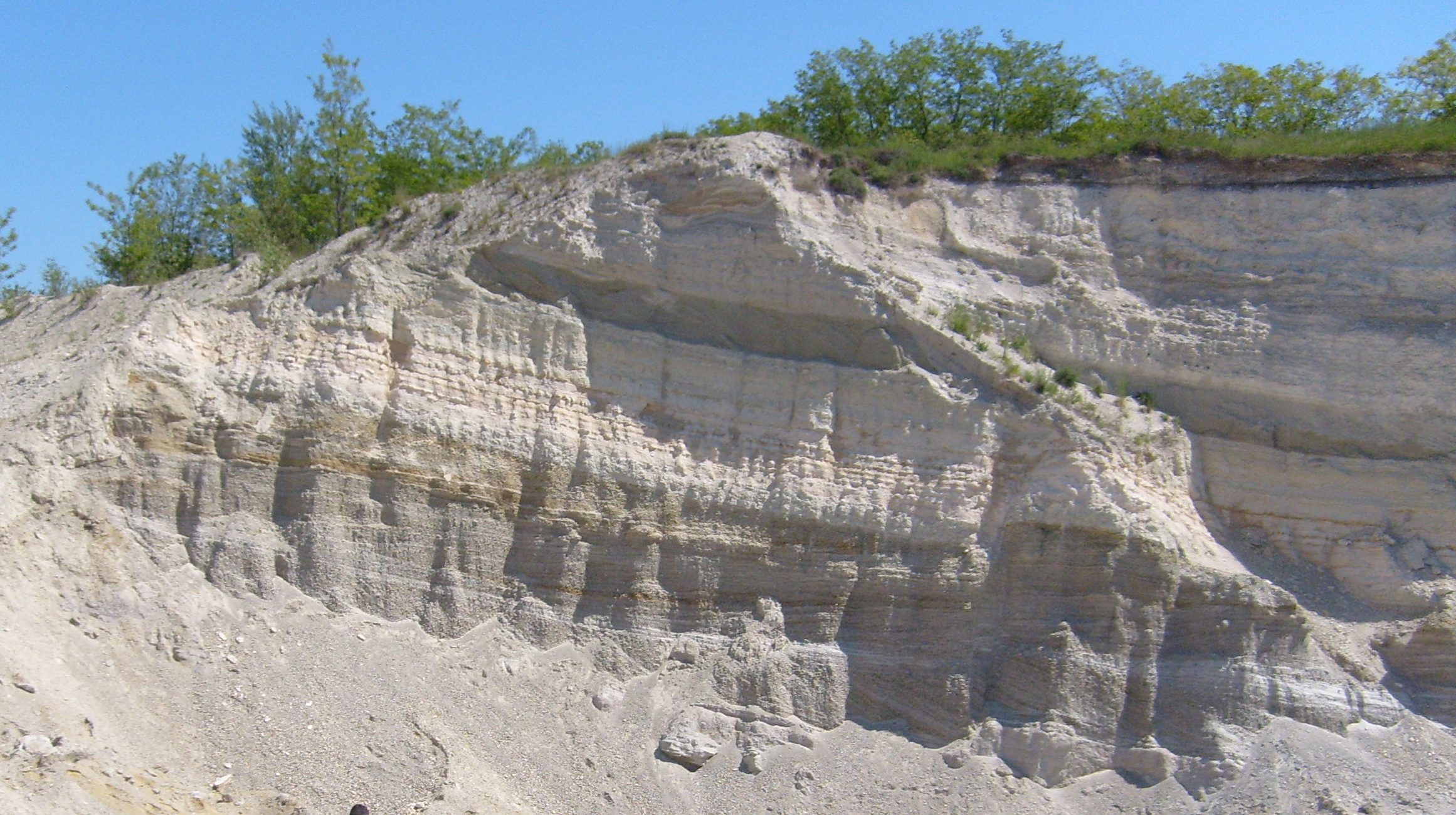 Homokbánya Sopronkőhidán. Miocén folyótorkolati üledék.